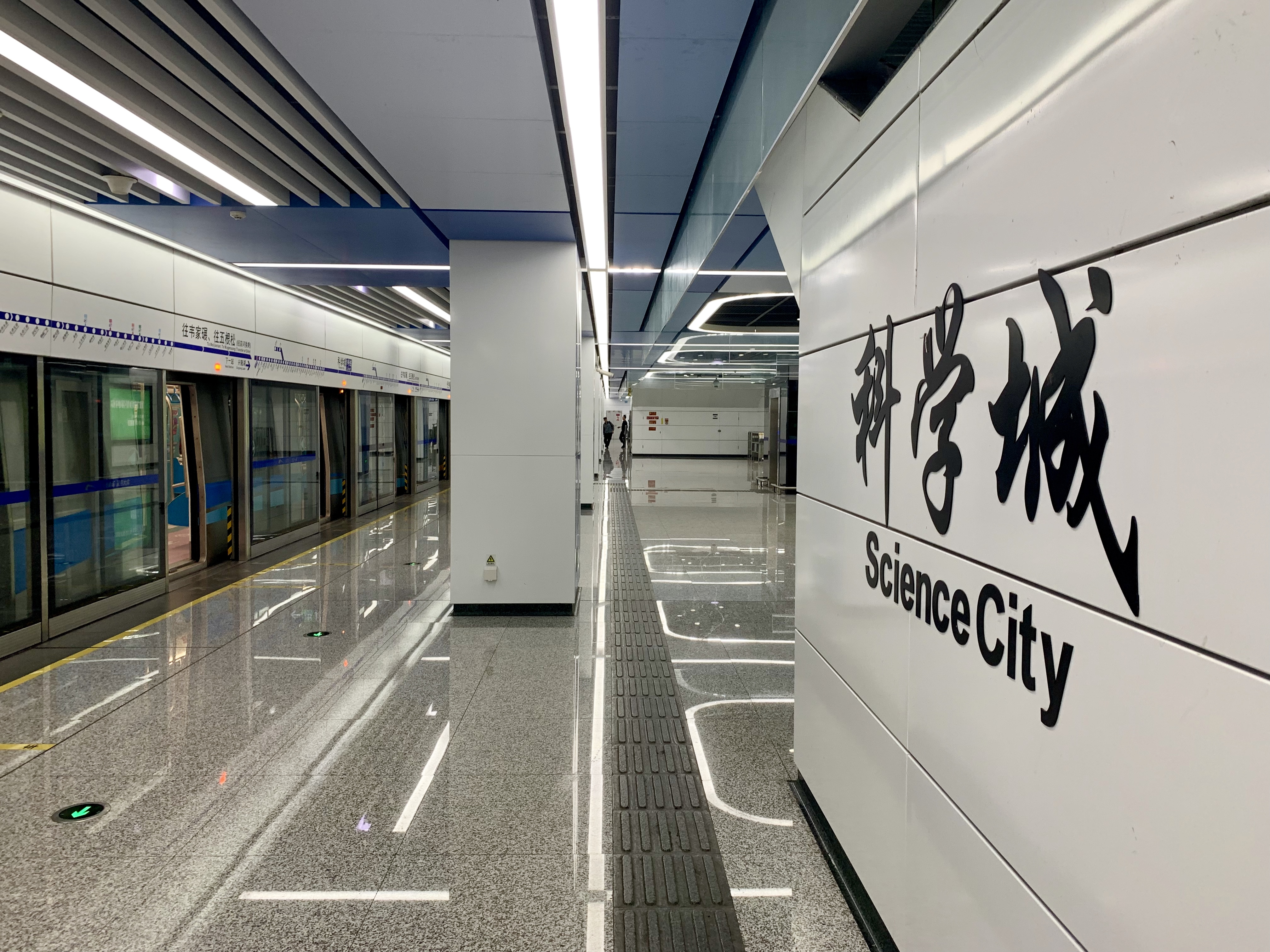 成都地铁科学城站